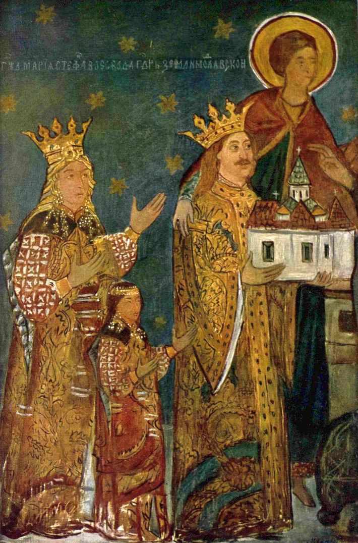 Portretu; lui Stefan cel Mare si a familiei sale de la Voronet